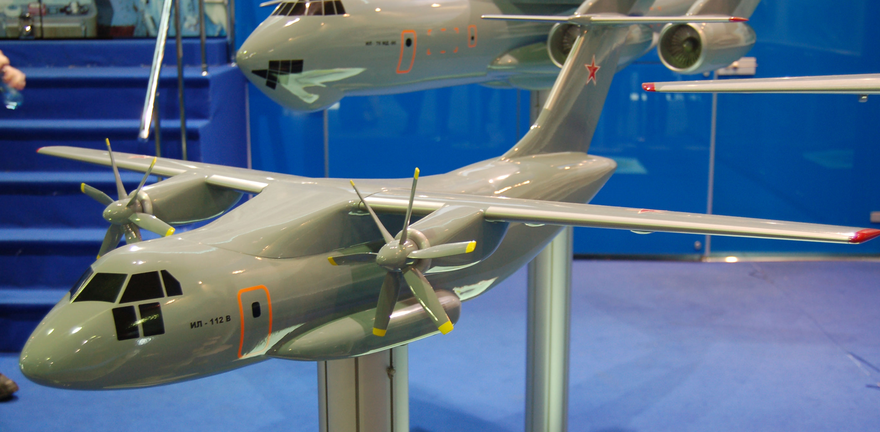 Макет самолёта Ил-112Э на выставке МАКС-2009